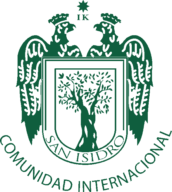 Escudo del distrito de San Isidro, Lima, Perú